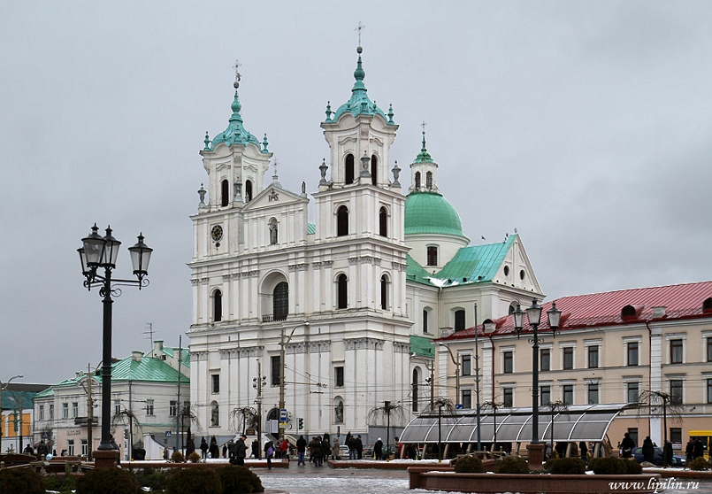 Гродна. Фарны касцёл